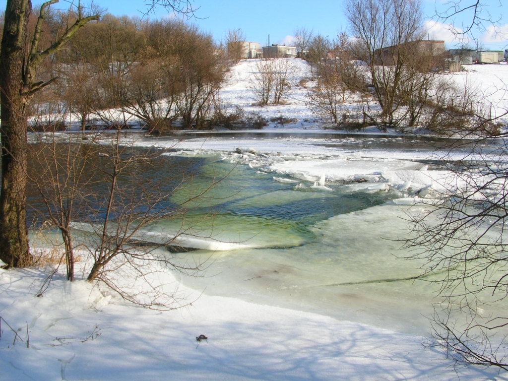 Jachcice w Bydgoszczy nad Brdą